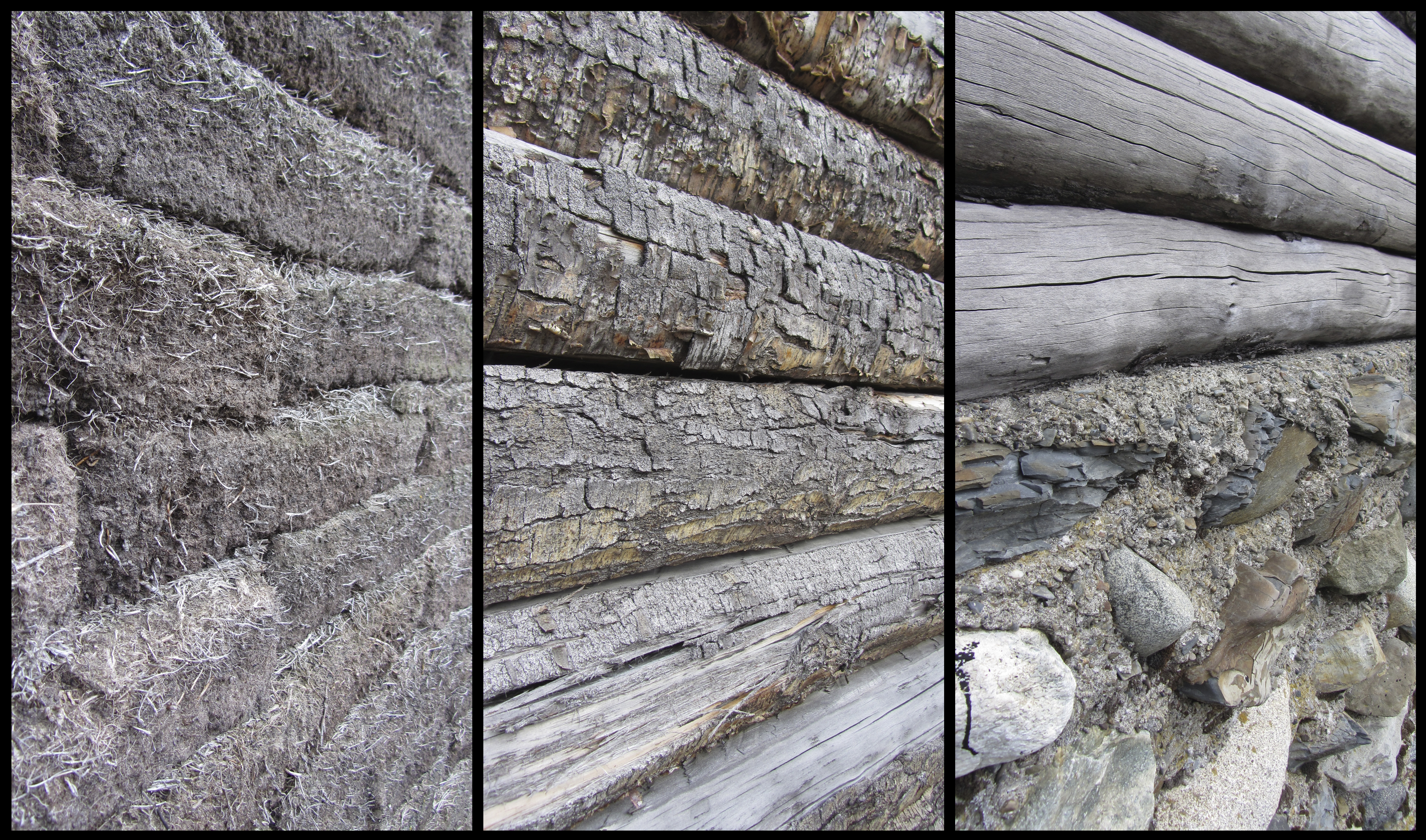 Materiales de construcción para construcciones del Fuerte Bulnes Magallanes, Chile This is a photo of a national monument in Chile: 179